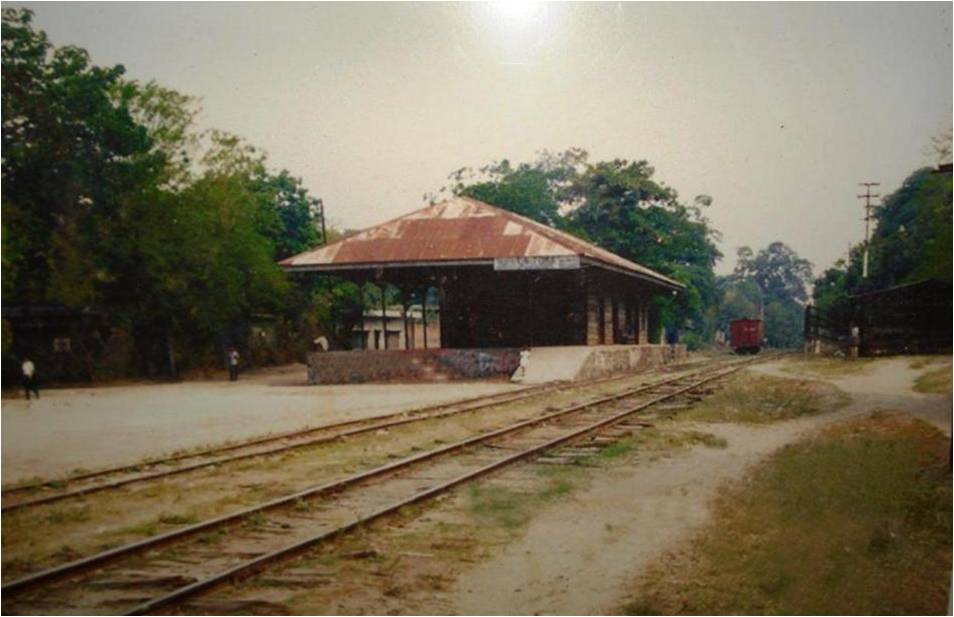 Estación de ferrocarriles en los años de función